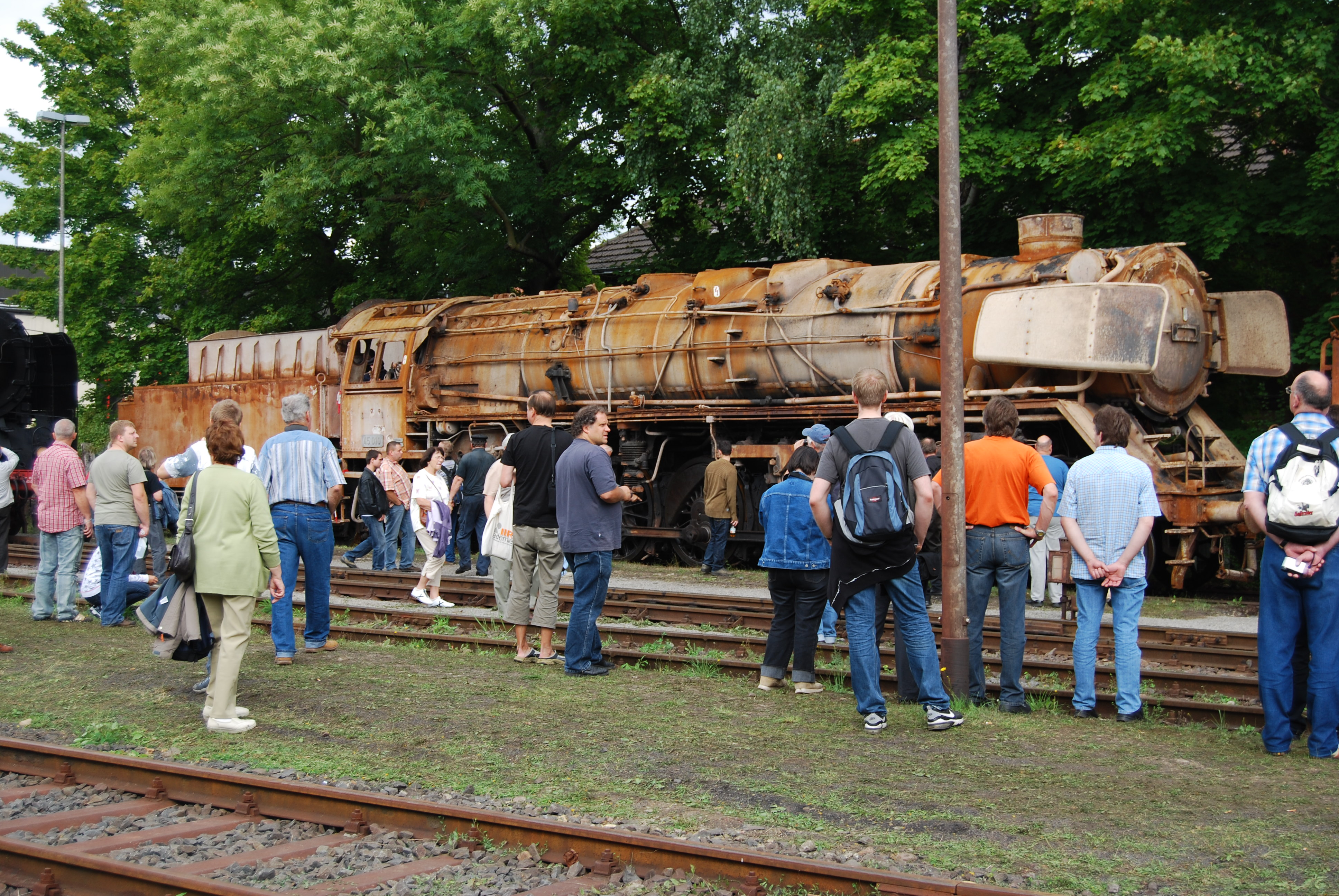 Die bei einem Brand stark beschädigte Dampflokomotive der Baureihe 45 der Deutschen Bundesbahn im Dampflokwerk Meiningen anläßlich der Meininger Dampfloktage 2008.